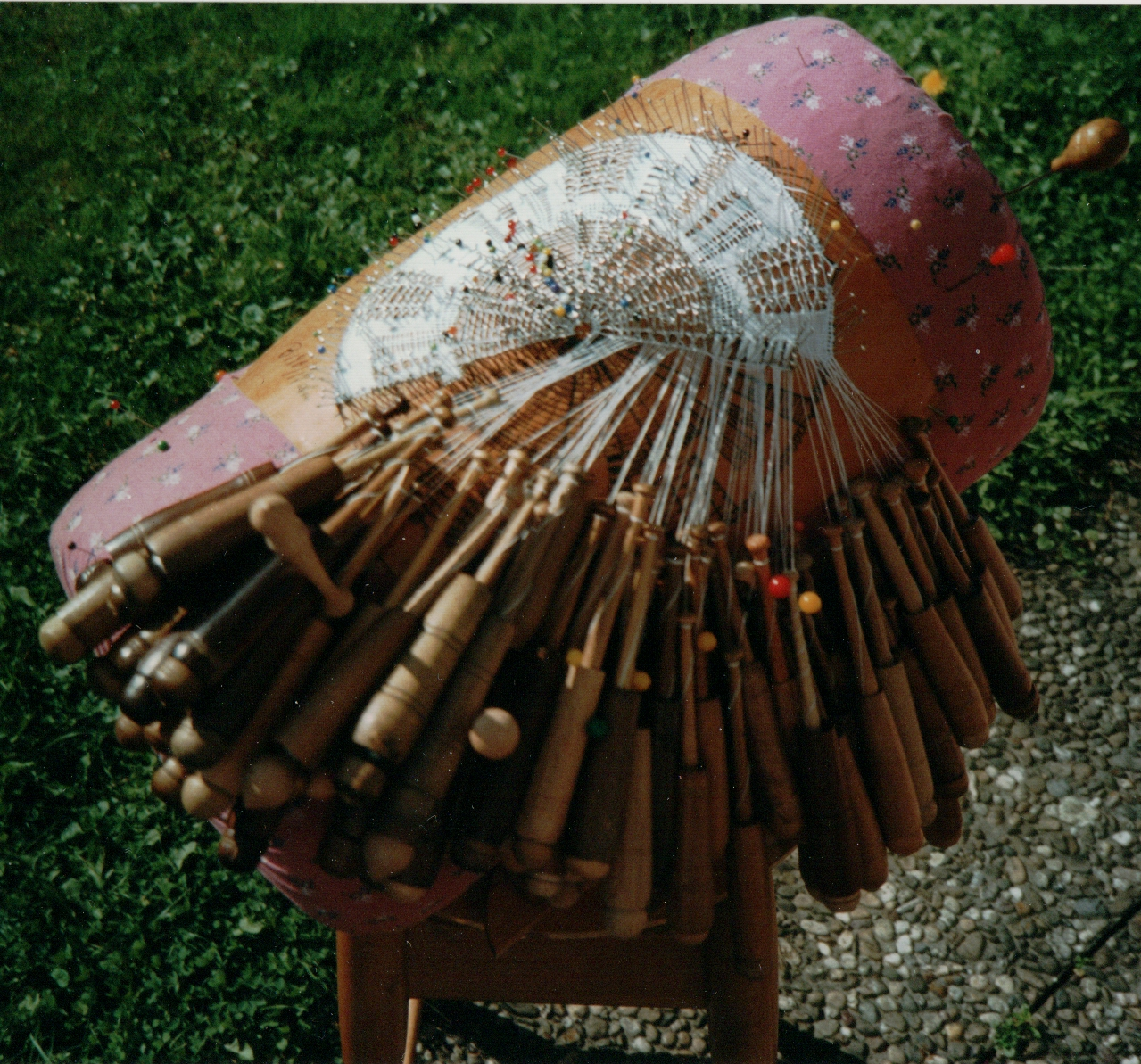 Klöppelsack